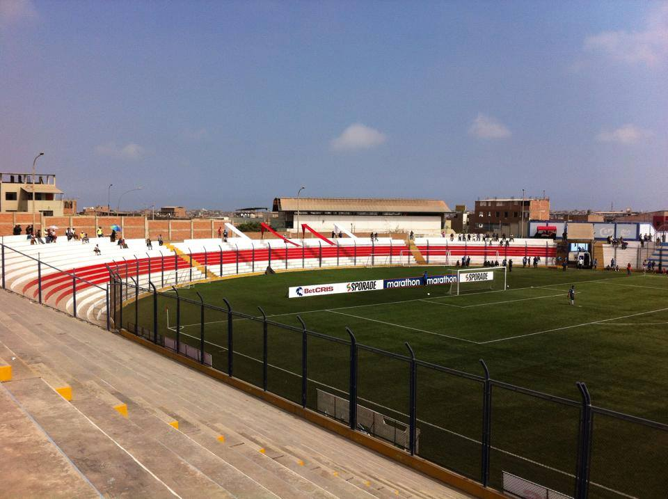 Estadio Iván Elías Moreno con los colores del Club Deportivo Municipal.